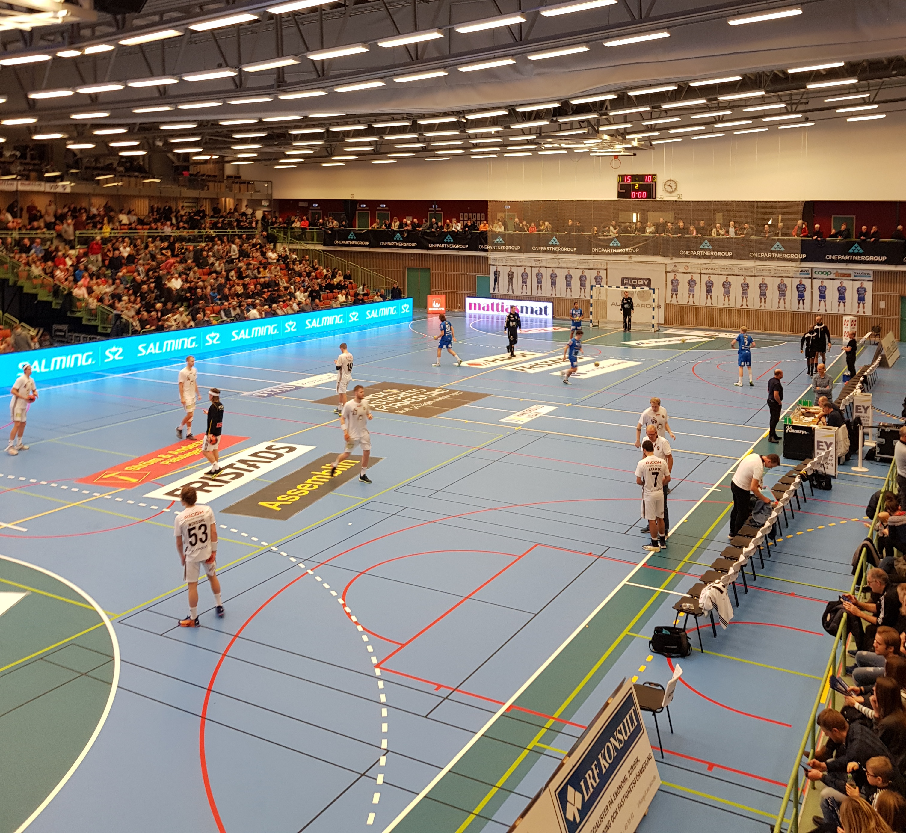 IFK Skövde möter AIK Handboll i Arena Skövde